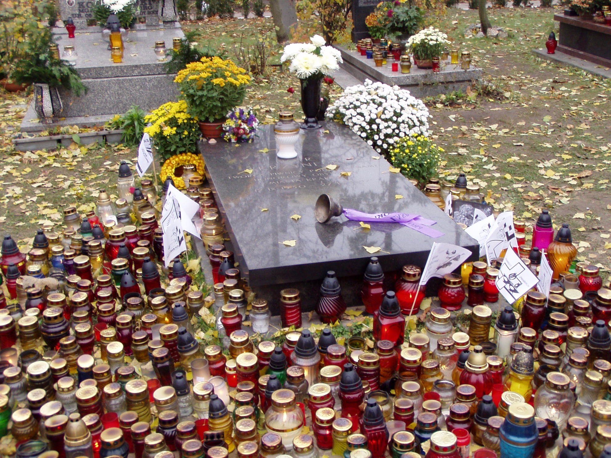 Nagrobek Piotra Skrzyneckiego.